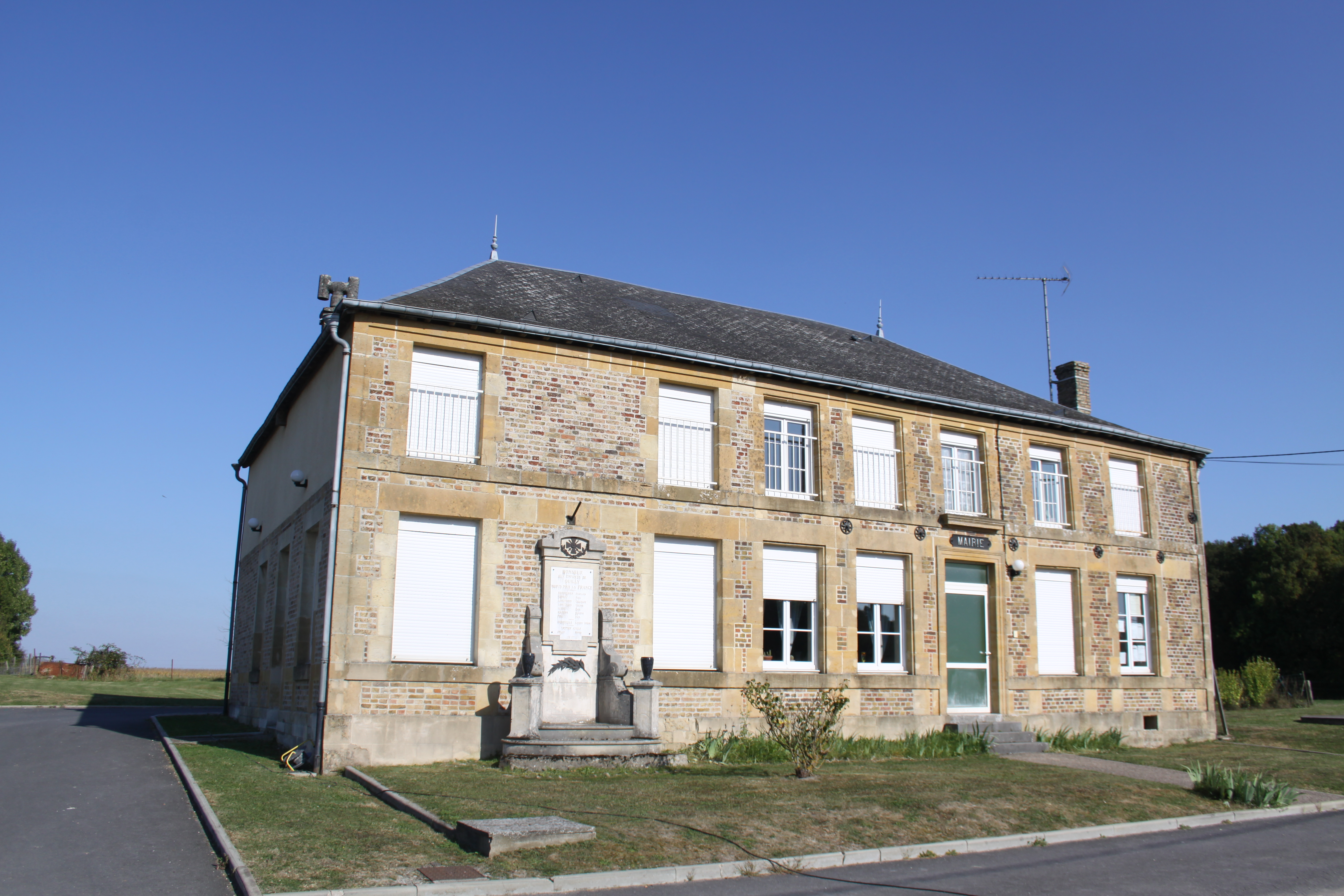 Village Ardennais